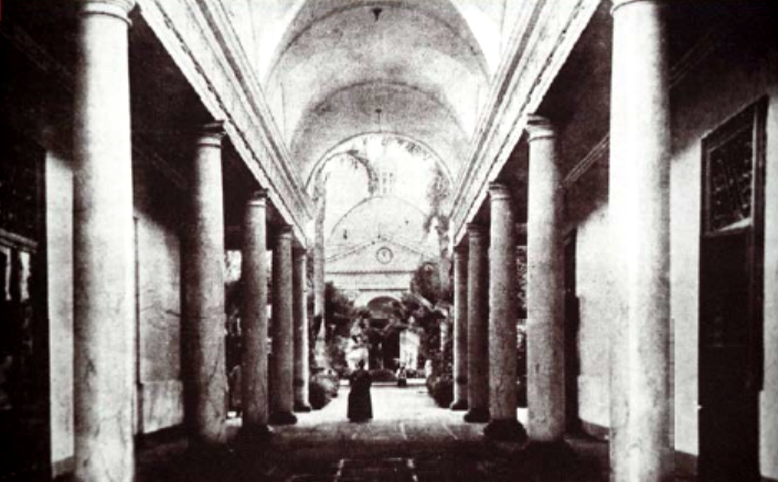 Interior del Hospital Dos de Mayo, en Lima, a principios del siglo XX